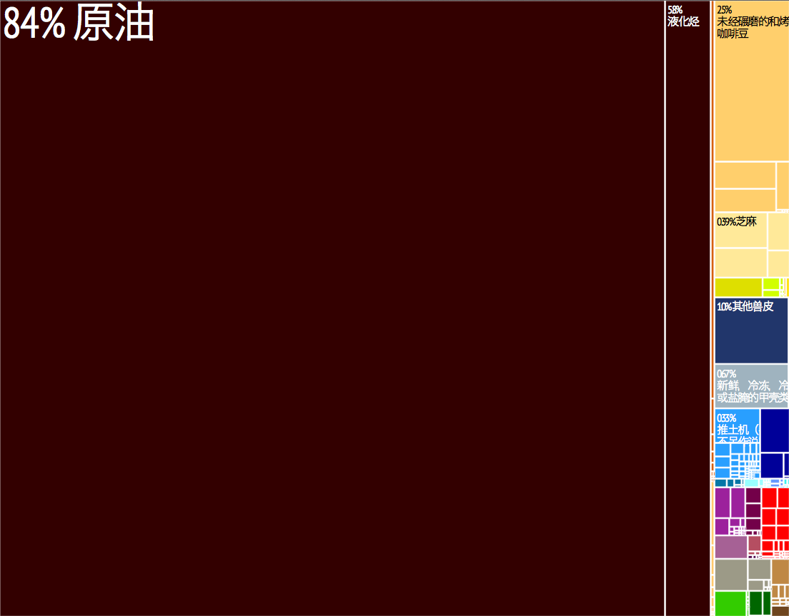 以28种颜色分类描述此国的产品出口，每种颜色盒代表一类产品，其大小代表此产品在此国总出口产品中的比重。